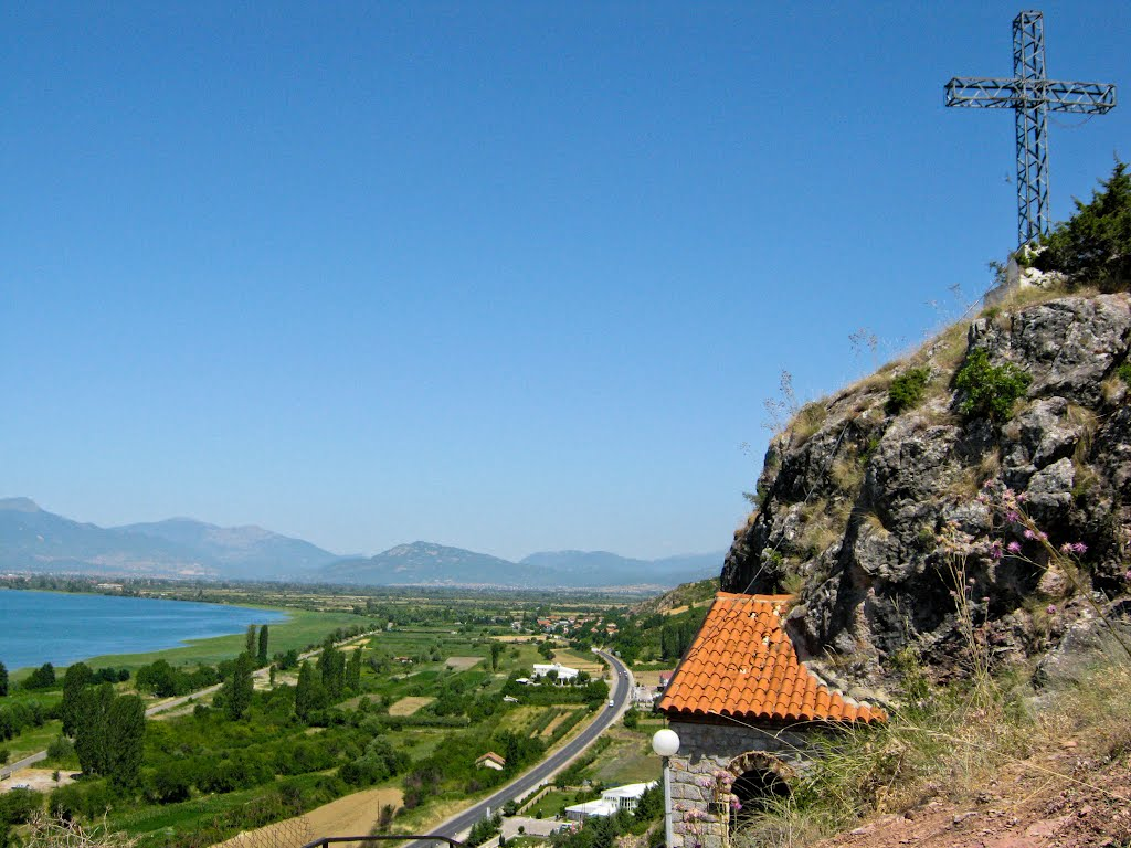 Црквата се наоѓа во близина на Еразмо црквата на велзот од Охрид кога се патува од Кичево